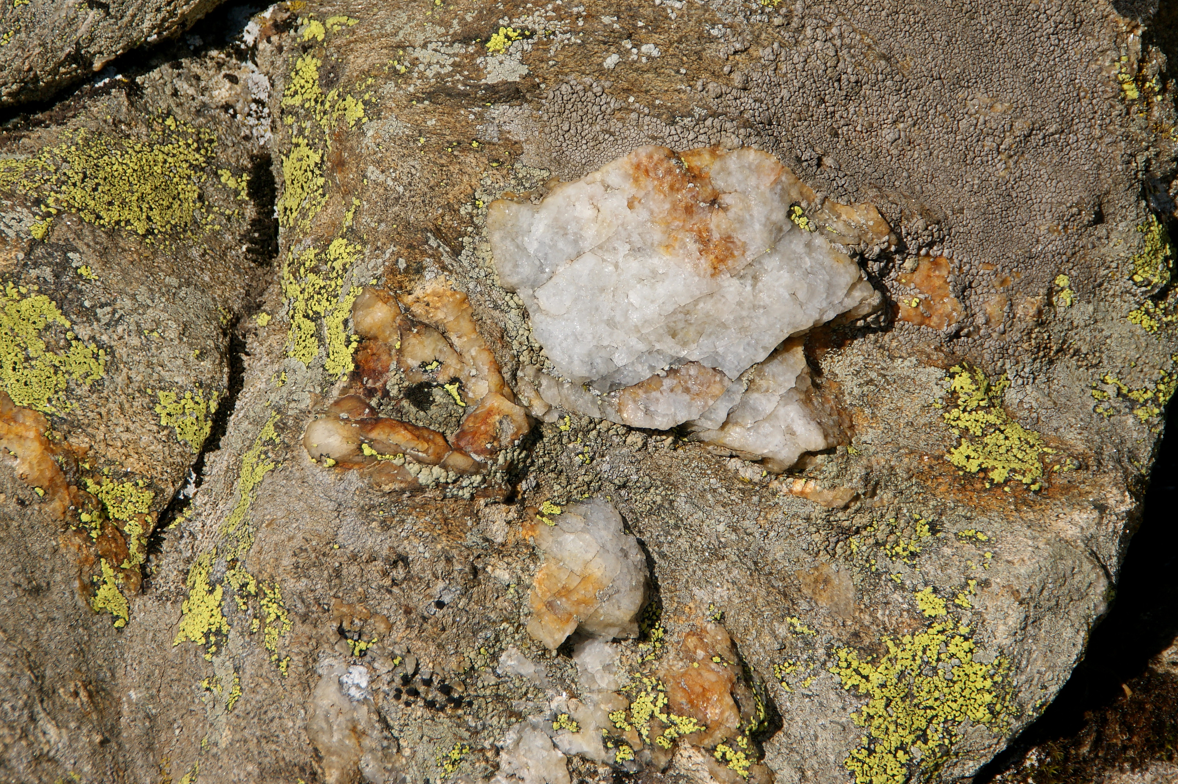 Am Wangenitzsee in der Schobergruppe, Kärnten, Österreich. Quarzeinschluss This file shows the National Park Hohe Tauern in Austria.